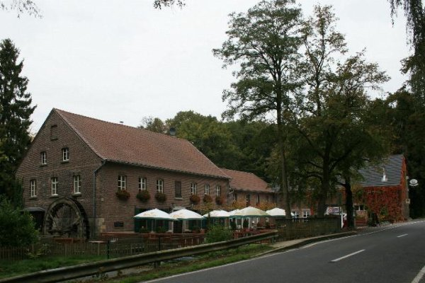 Denkmal Nr. 105 in Schwalmtal-Lüttelforst